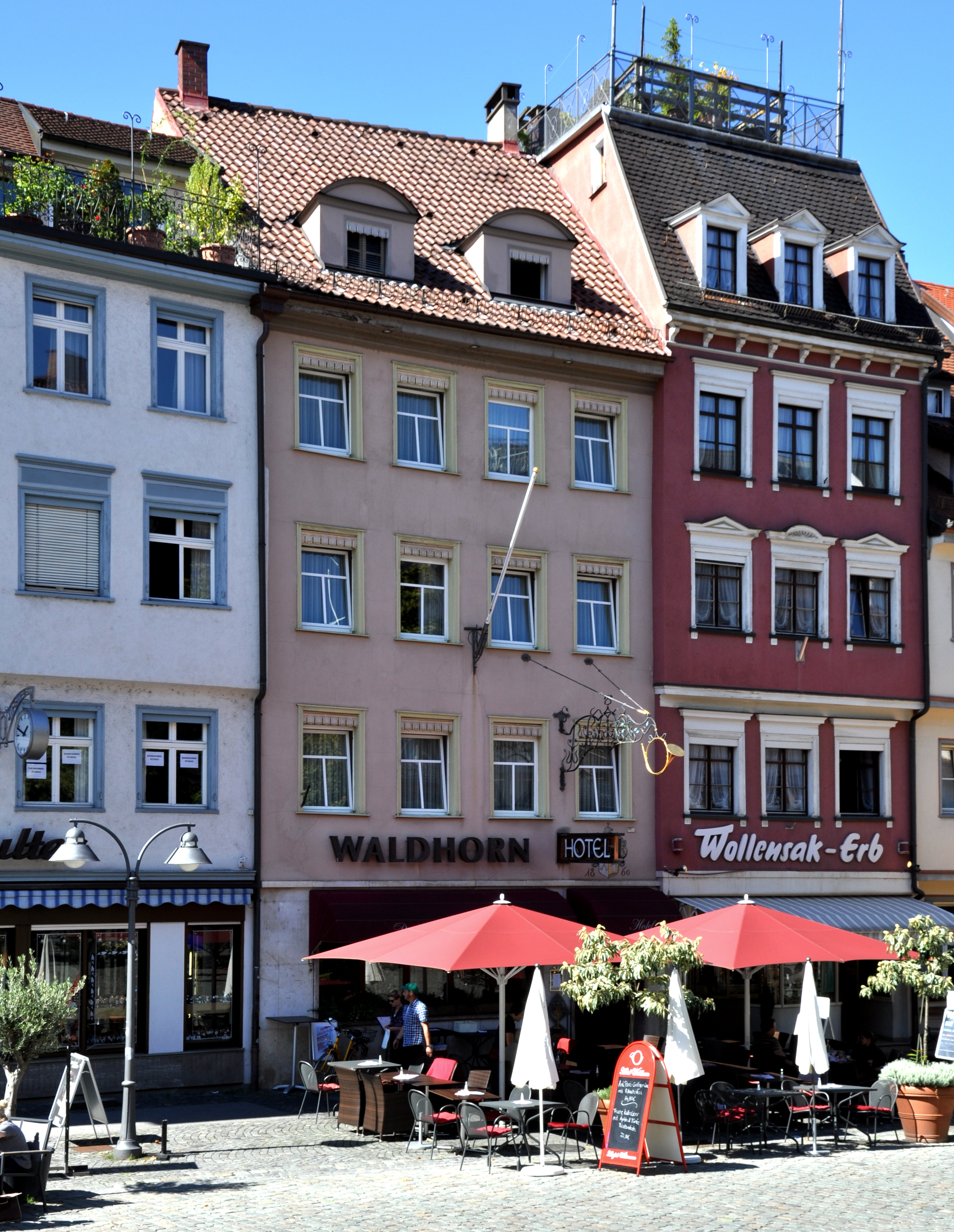 Ravensburg, Marienplatz, Hotel Waldhorn